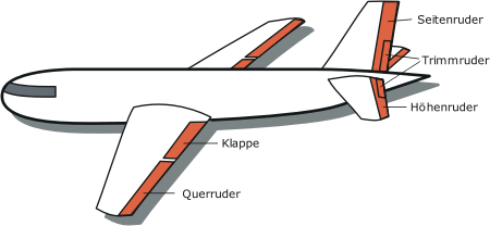 Flugzeug mit Rudern und Klappen